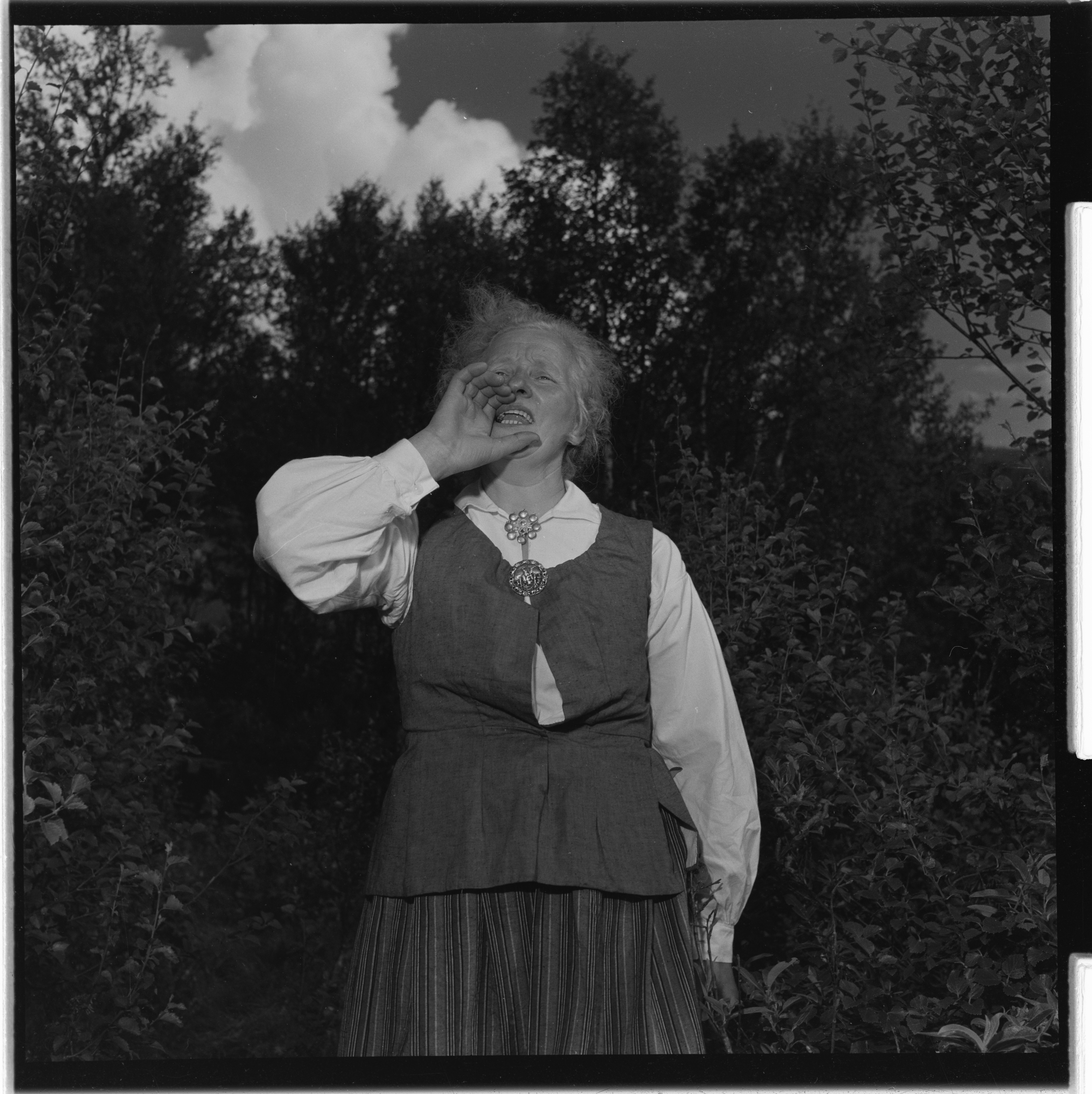 Bildet er hentet fra Arkivverket. Lur- og lokkestevne i Alvdal. NÅ nr. 16 Arkivinstitusjon : Riksarkivet Arkivnavn : Billedbladet NÅ Sted : Norge, Hedmark, Alvdal, Emneord: Kulokk, Sommer, Natur, Bunader, Kvinner Avbildet